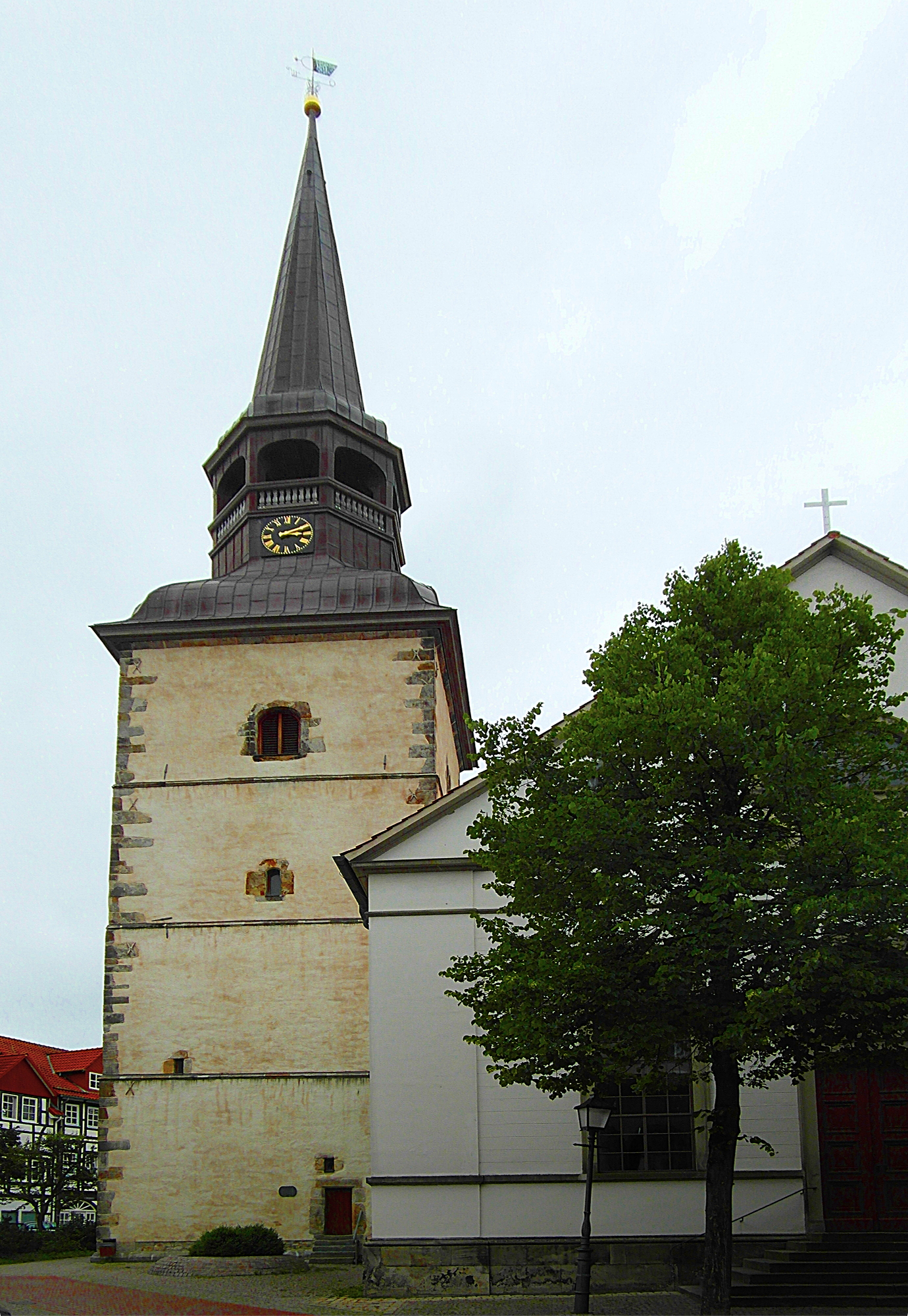 Petri-Pauli-Kirche in Bad Münder am Deister. Der Turm entstand im 16. Jhdt, Das Kirchenschiff rechts wurde 1839/40 durch einen klassizistischen Neubau ersetzt.